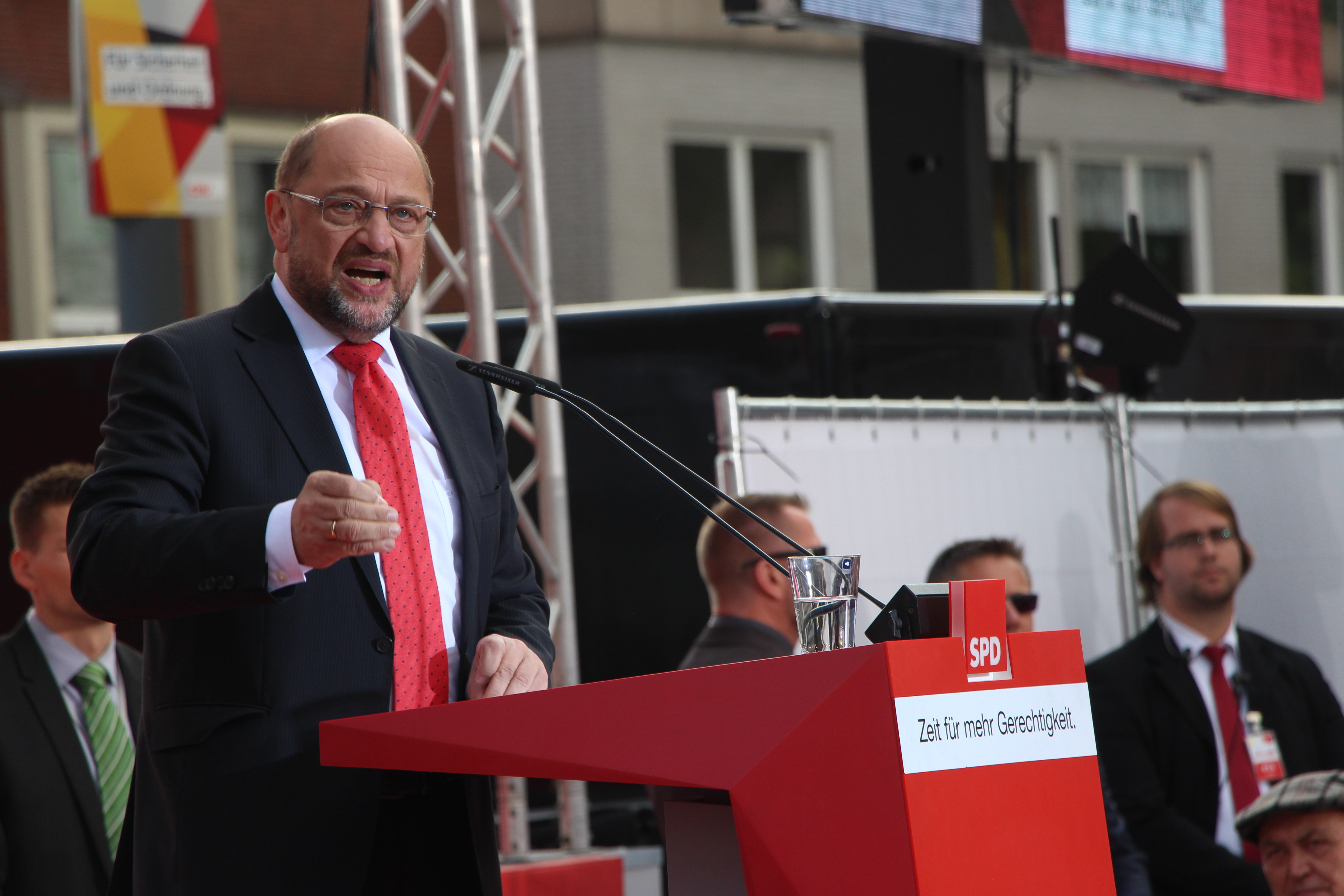 Martin Schulz bei einer SPD-Wahlveranstaltung in Gelsenkirchen, 20. September 2017.